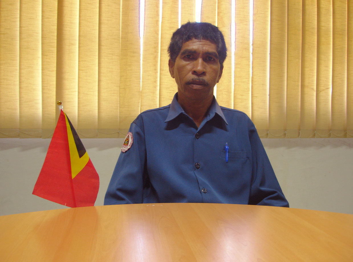 Renato Nunes Serão, Administrator des Subdistrikts Liquica